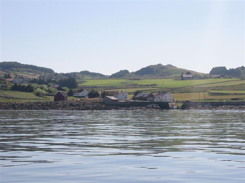 Jølle